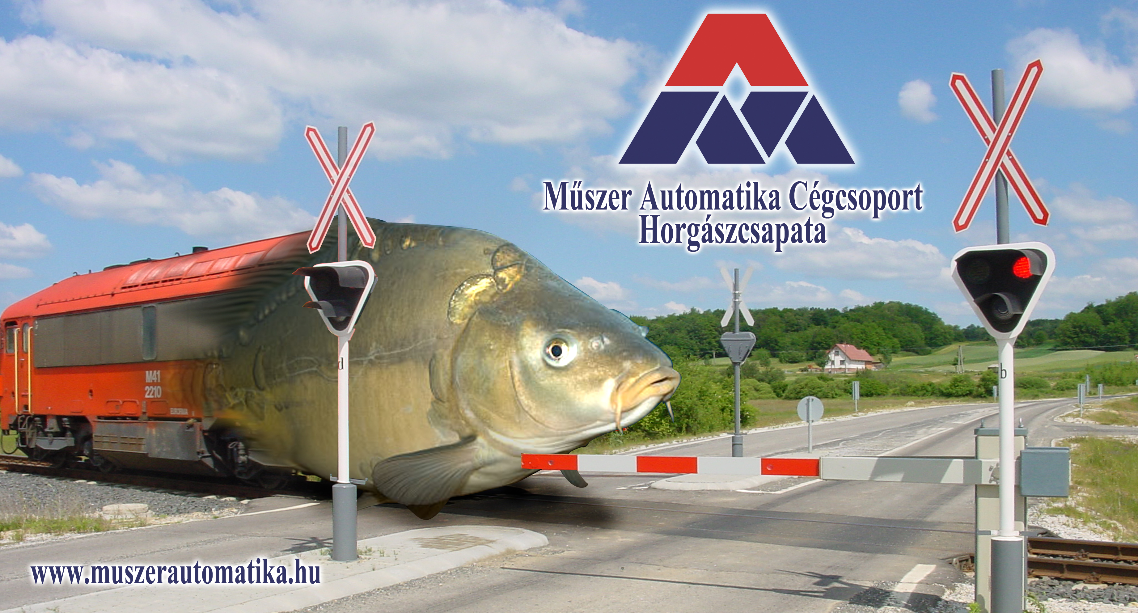 A Műszer Automatika által szponzorált sporthorgász csapat logója.